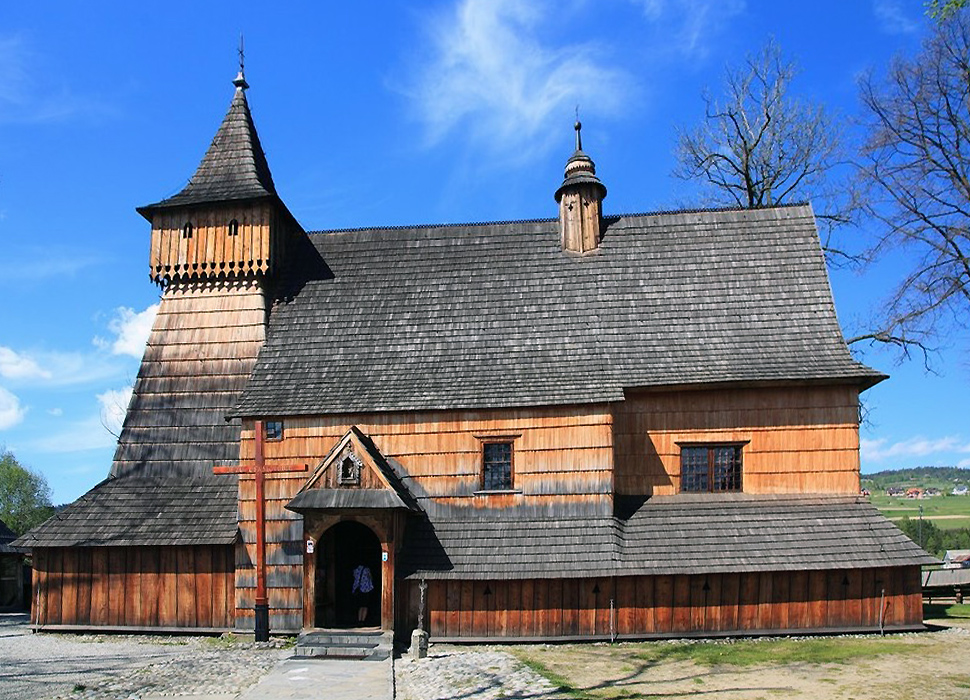 Dębno (powiat nowotarski). Drewniany kościół gotycki św. Michała Archanioła